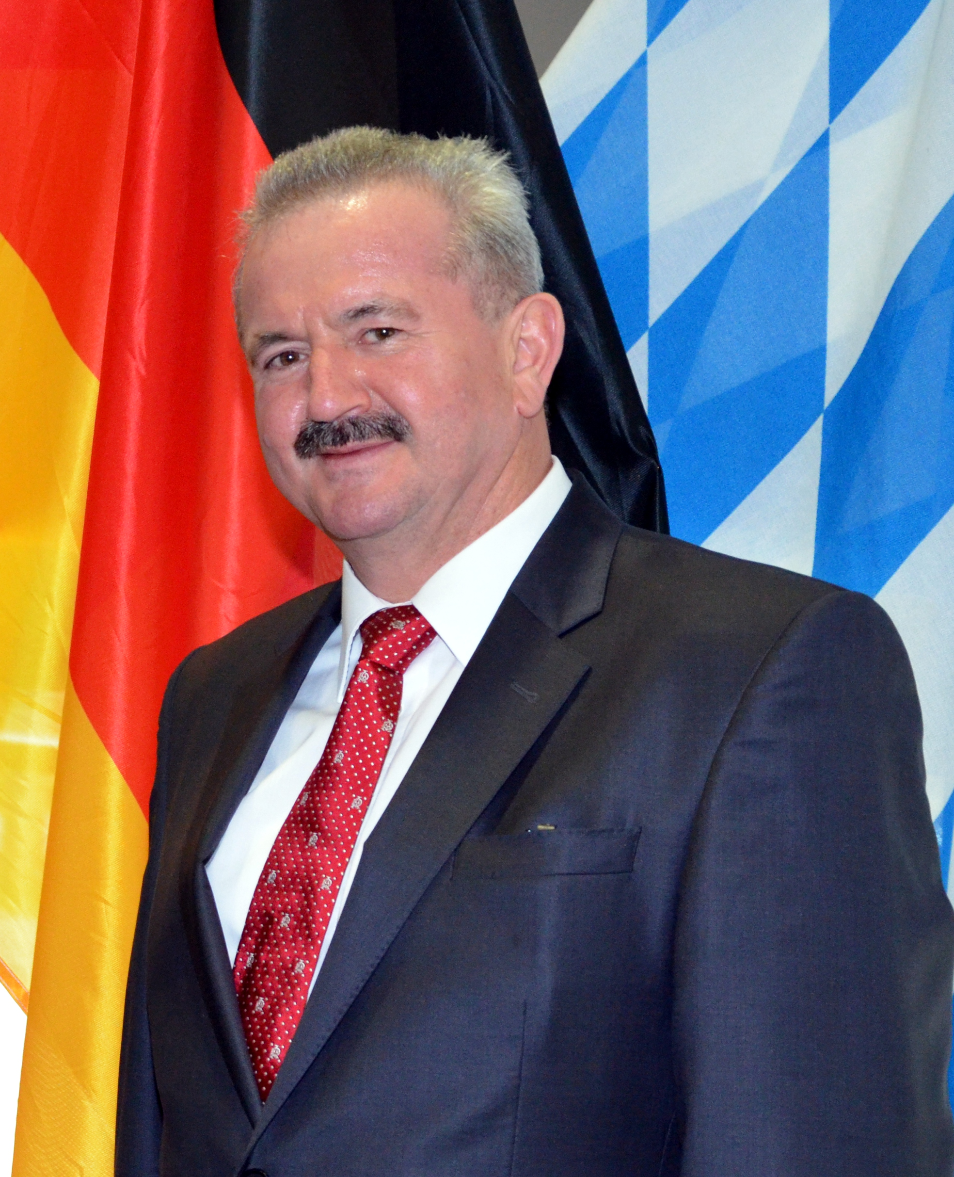 Reimund Neugebauer, Präsident der Fraunhofergesellschaft